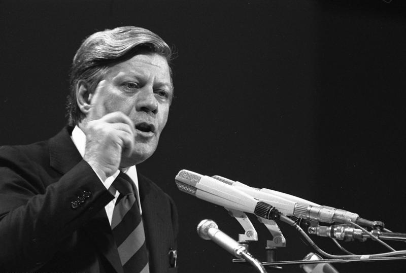 Außerordentlicher Parteitag der SPD in der Westfalenhalle Dortmund